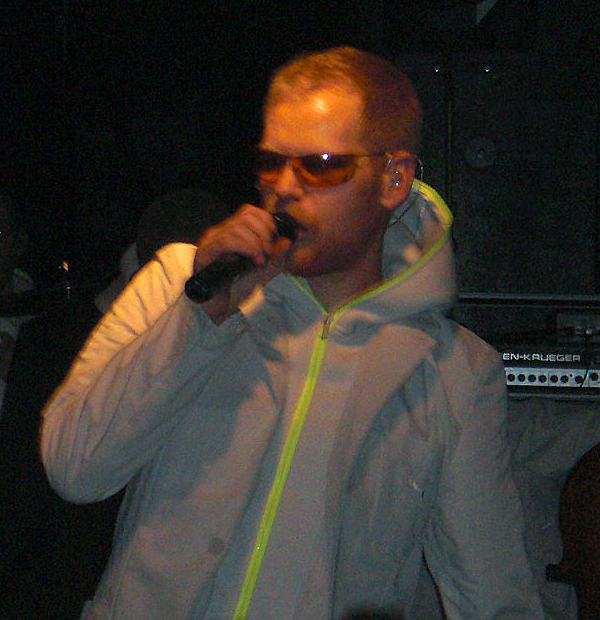 Peter Fox beim Myspace Secret Gig im Ostwerk in Augsburg